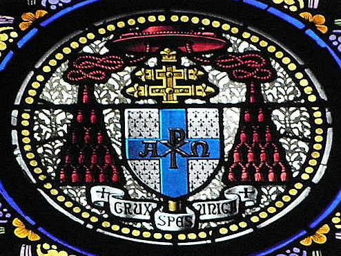 Armes de Guillaume-Marie-Joseph Labouré. Vitrail de la basilique Notre-Dame-de-Bonne-Nouvelle de Rennes (35).